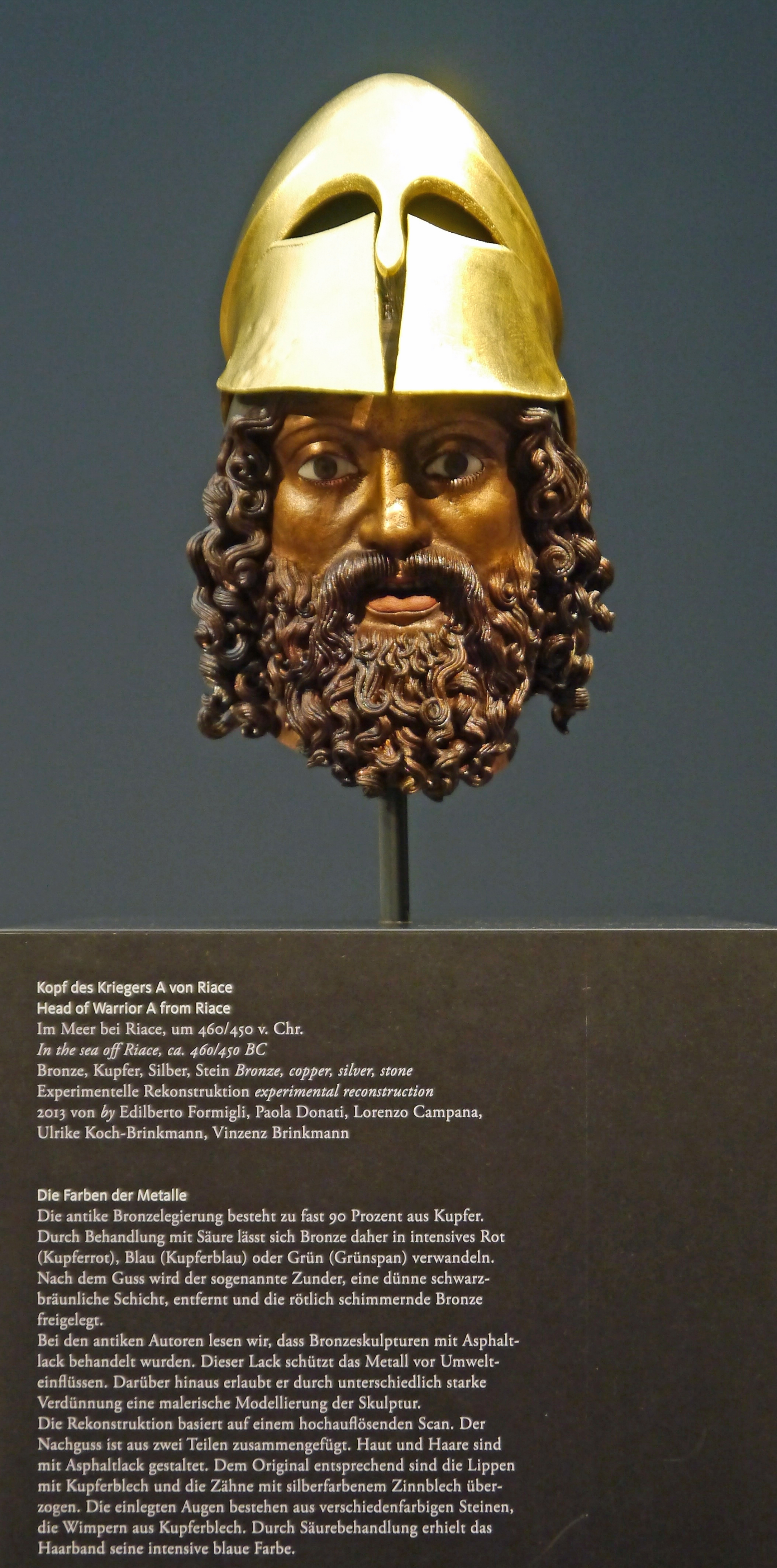 Kopf des Kriegers A von Riace. (ca. 460/450 v. Chr.). Experimenteller Bronze-Nachguss, zusätzliche mit Helm ausgestattet.